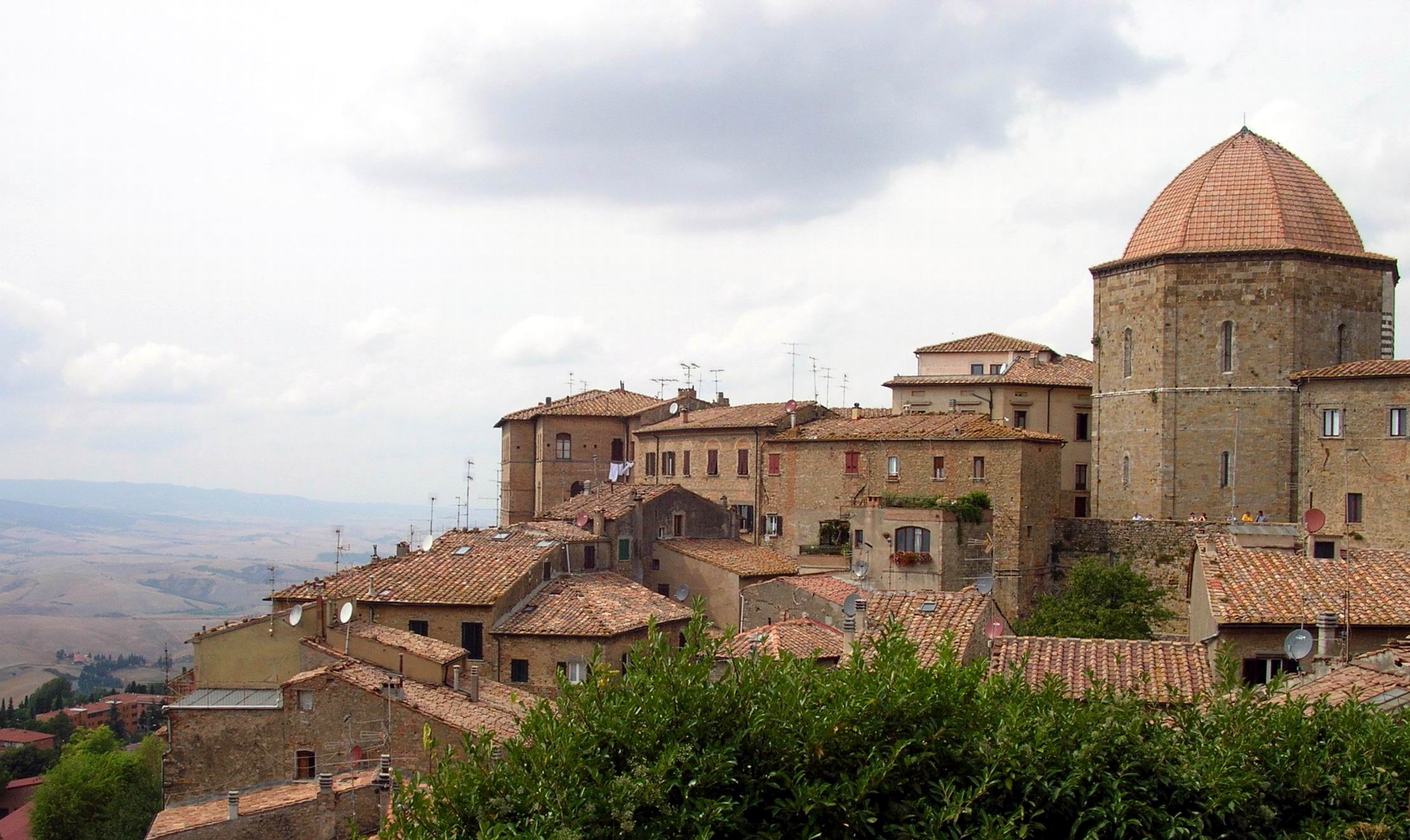 Volterra, particolare del centro storico